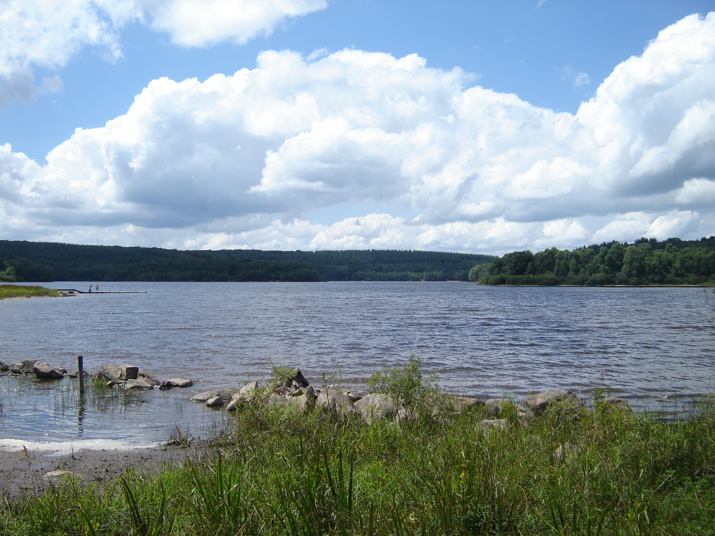 Le lac de Saint Agnan vu du sentier protégé dans le parc du Morvan, près du village de vacances du Bois du Loup.